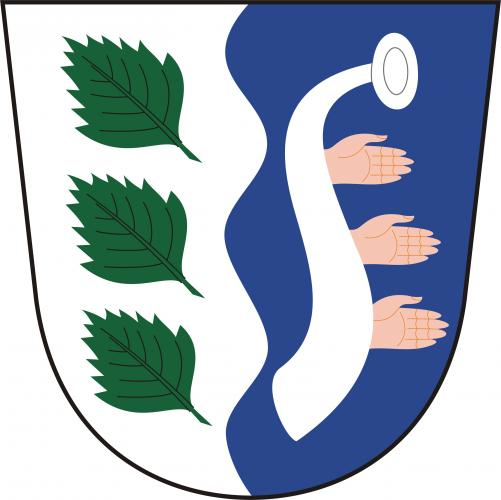 znak, Lhota u Lysic, okres Blansko